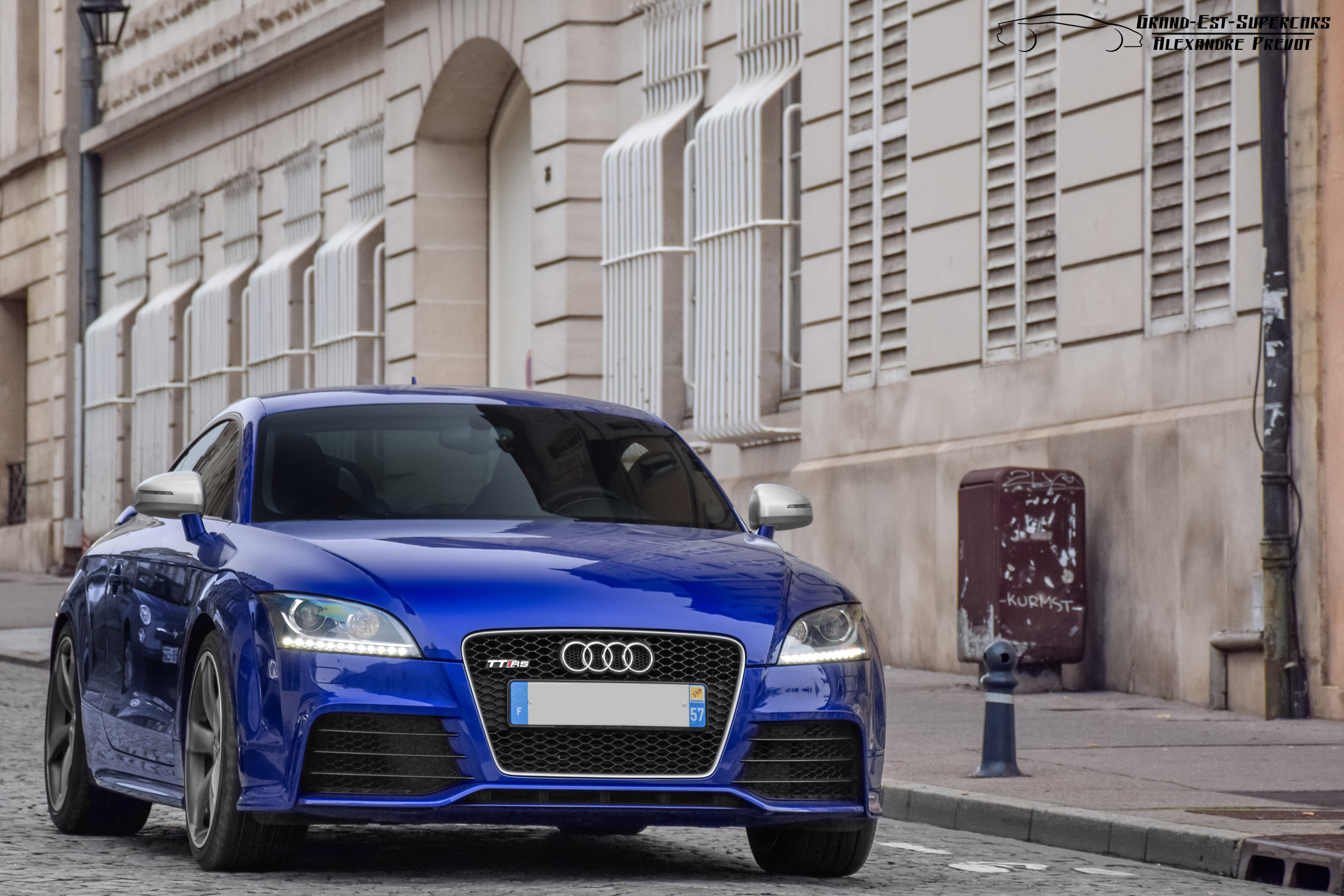 Année du modèle présenté : 2011